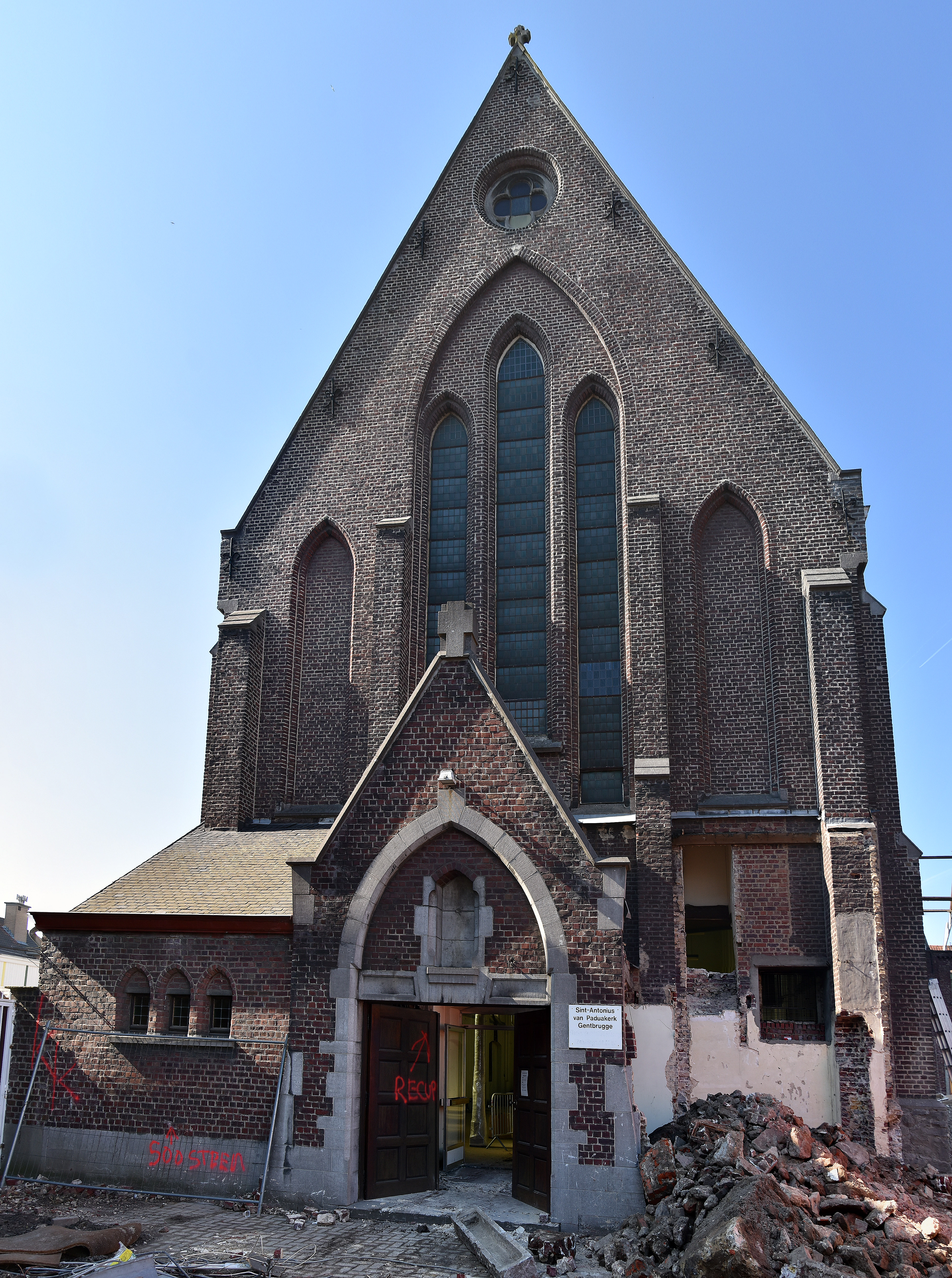 Sint-Antonius van Paduakerk (Gentbrugge) 22-03-2019 14-16-29